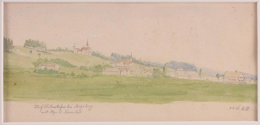 Dorf Leitershofen bei Augsburg mit Alpe u. Nervenheil. Aquarellierte Bleistiftzeichnung, monogrammiert und (18)88 datiert. Ca. 11 x 22 cm